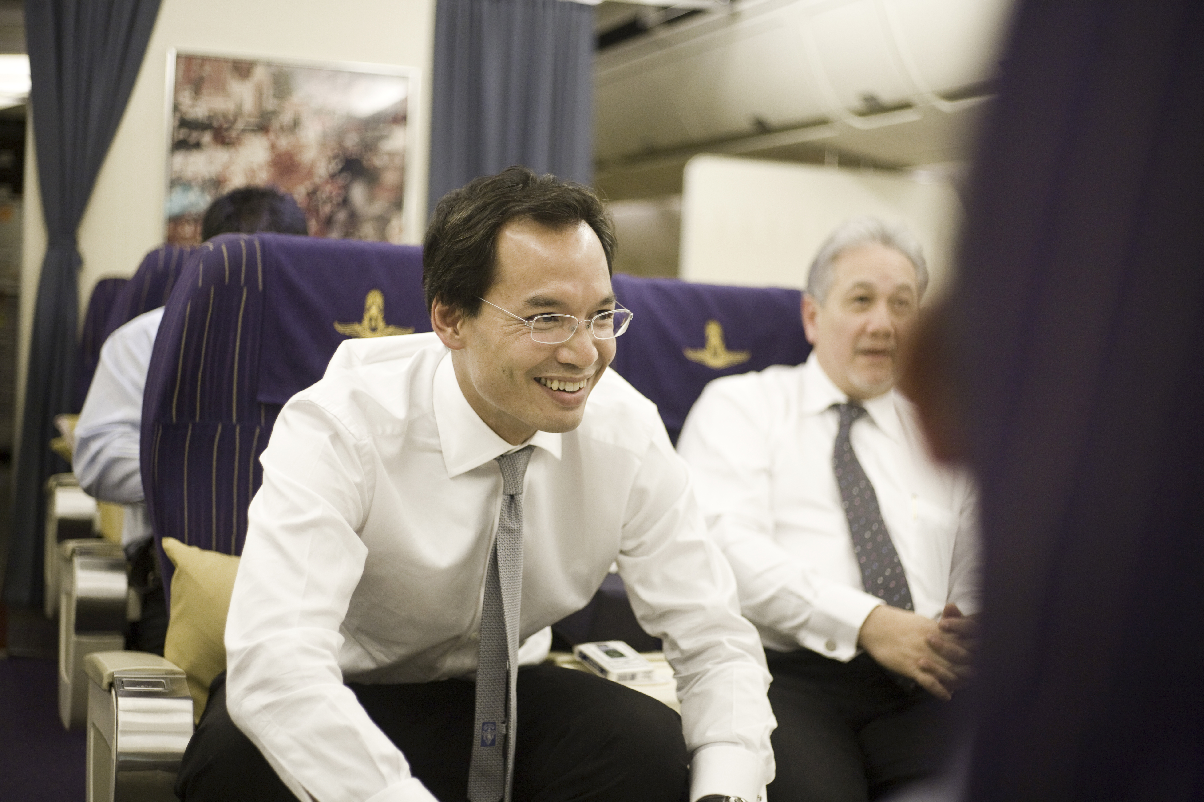 นายกรัฐมนตรี และคณะ เดินทางกลับหลังจากเข้าร่วมการประชุมผู้นำเศรษฐกิจ APEC 2009 ระหว่างวันที่ 13-15 พฤศจิกายน 2552 15พฤศจิกายน2552 (The Official Site of The Prime Minister of Thailand Photo by พีรพัฒน์ วิมลรังครัตน์)